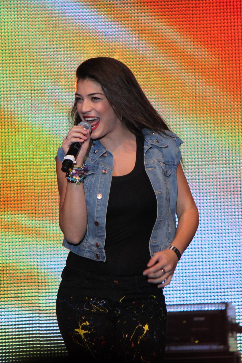 La cantante chipriota Ivi Adamou en el Stockholm Pride 2012.